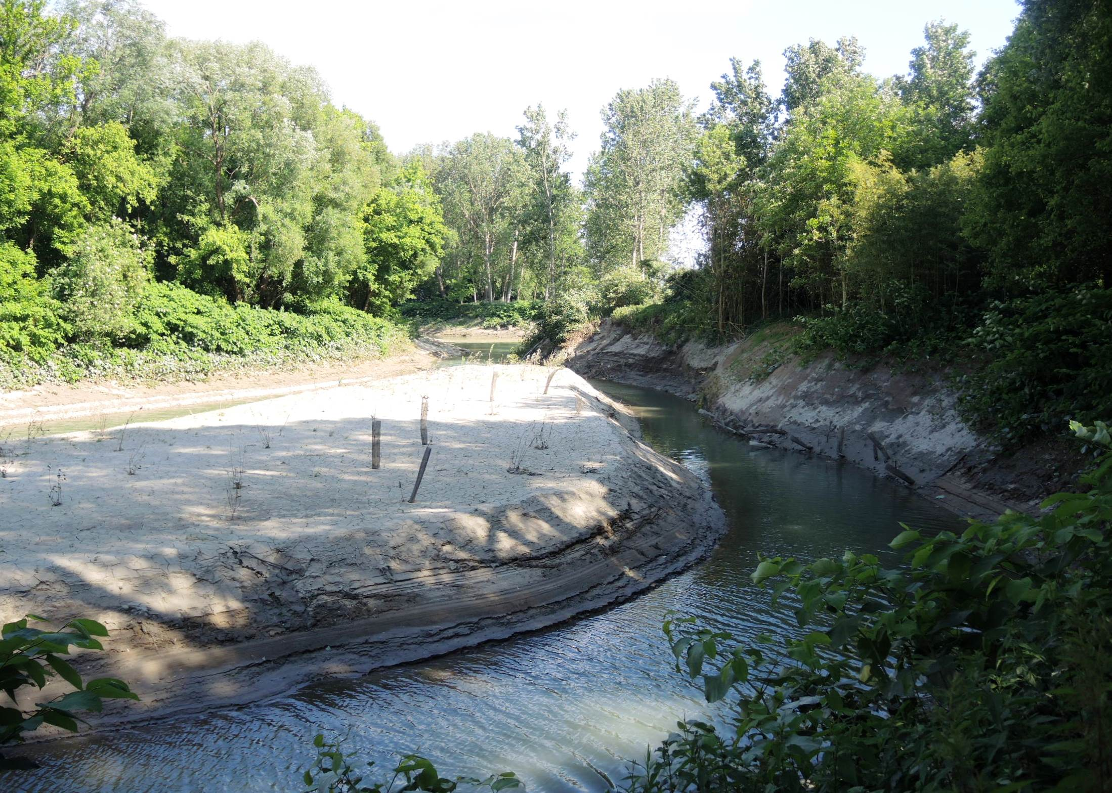 Peyraud détail